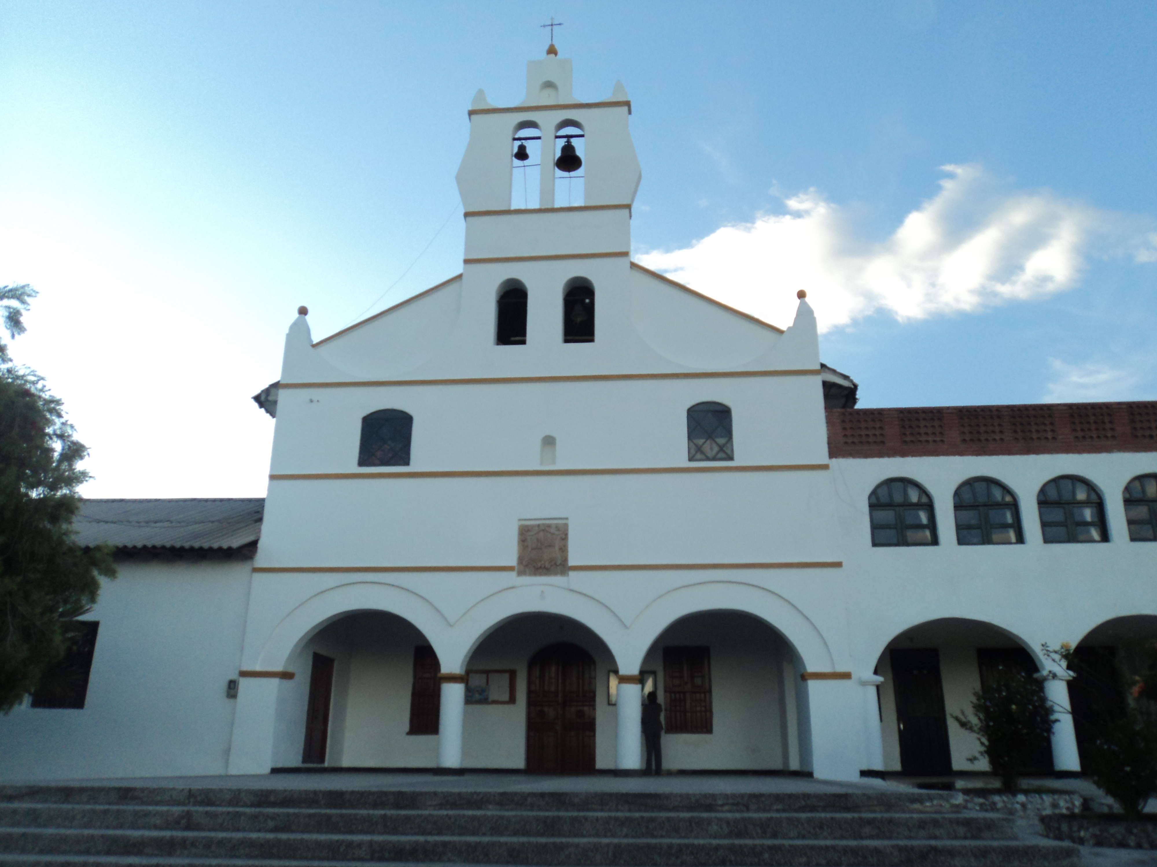 Parque principal de La trinidad " Vereda de Duitama"